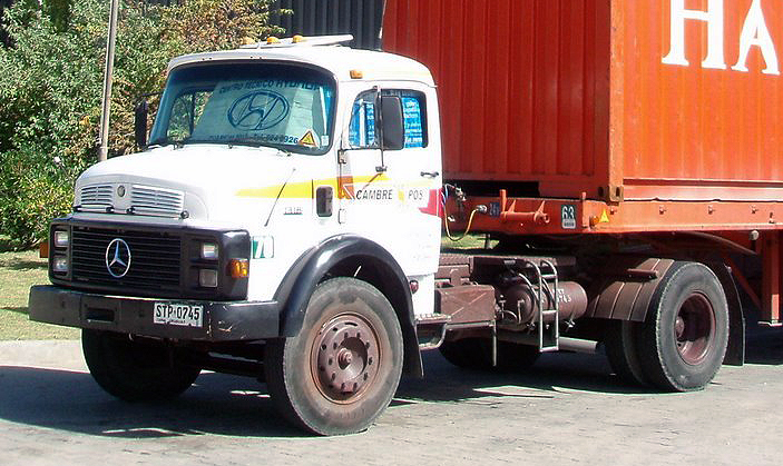 Brazilian-built Mercedes-Benz L 1318 Rundhauber seen in Uruguay